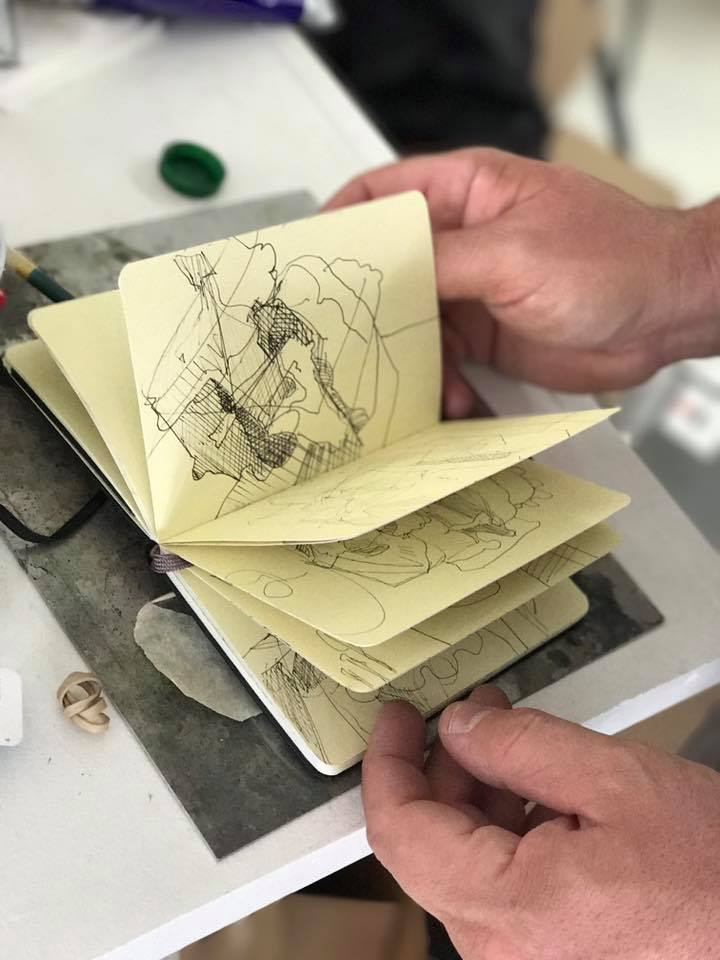 Studio d'artiste de Peter Maslow à Brooklyn